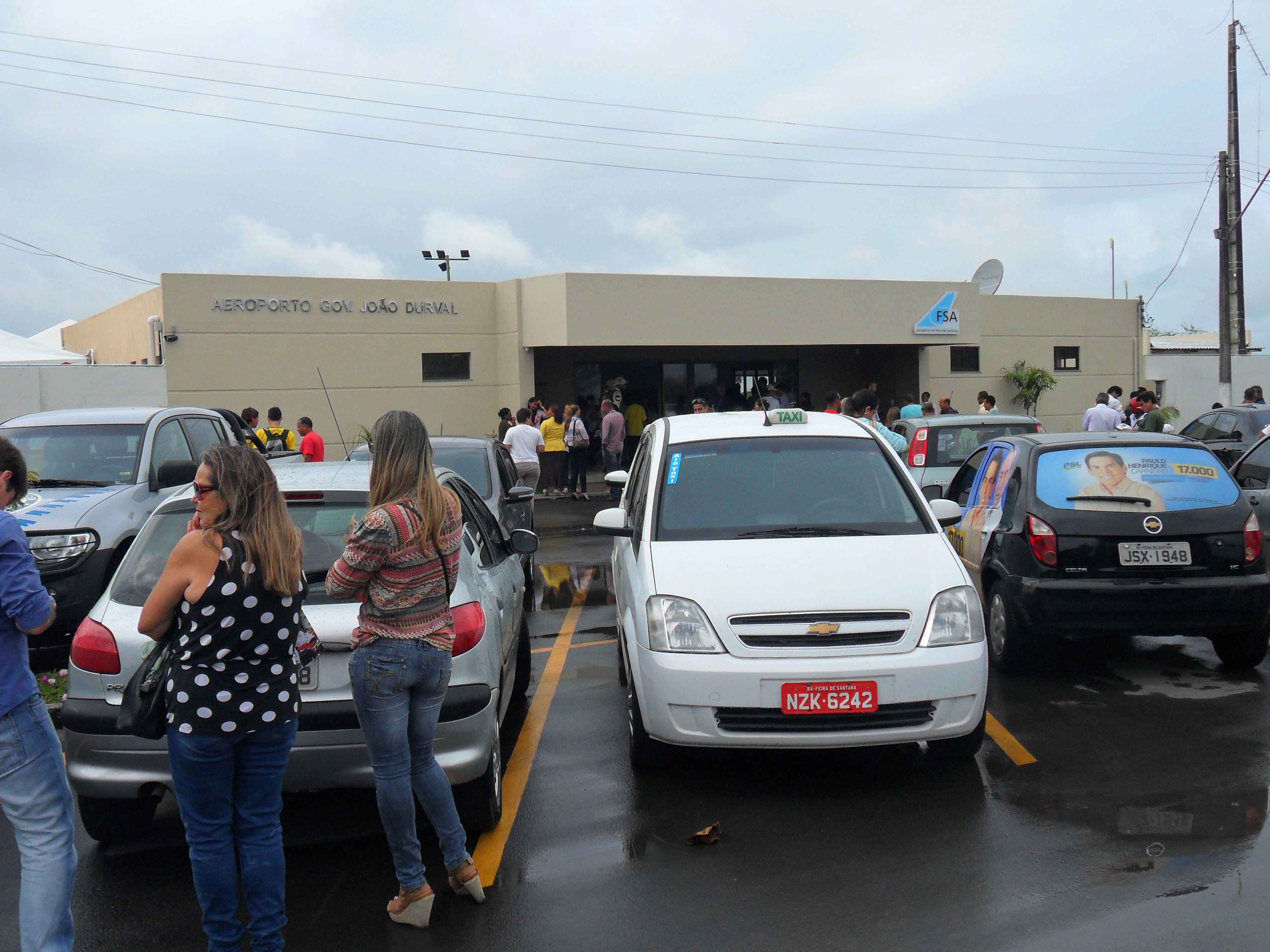 Estacionamento e fachada do aeroporto de Feira de Santana